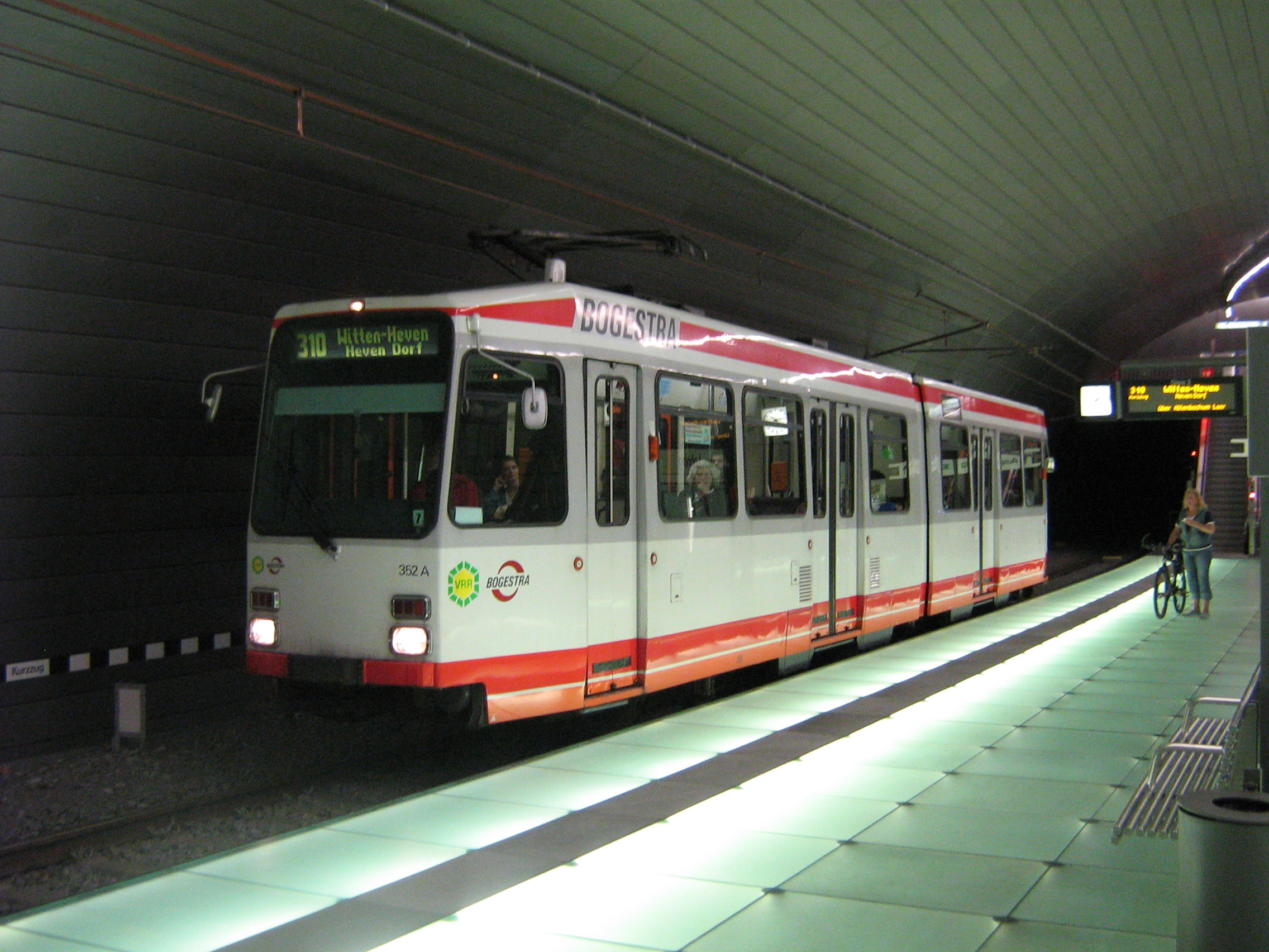 M6 der Bogestra auf der Linie 310 in Richtung Wattenscheid-Hoentrop in der Station Lohring